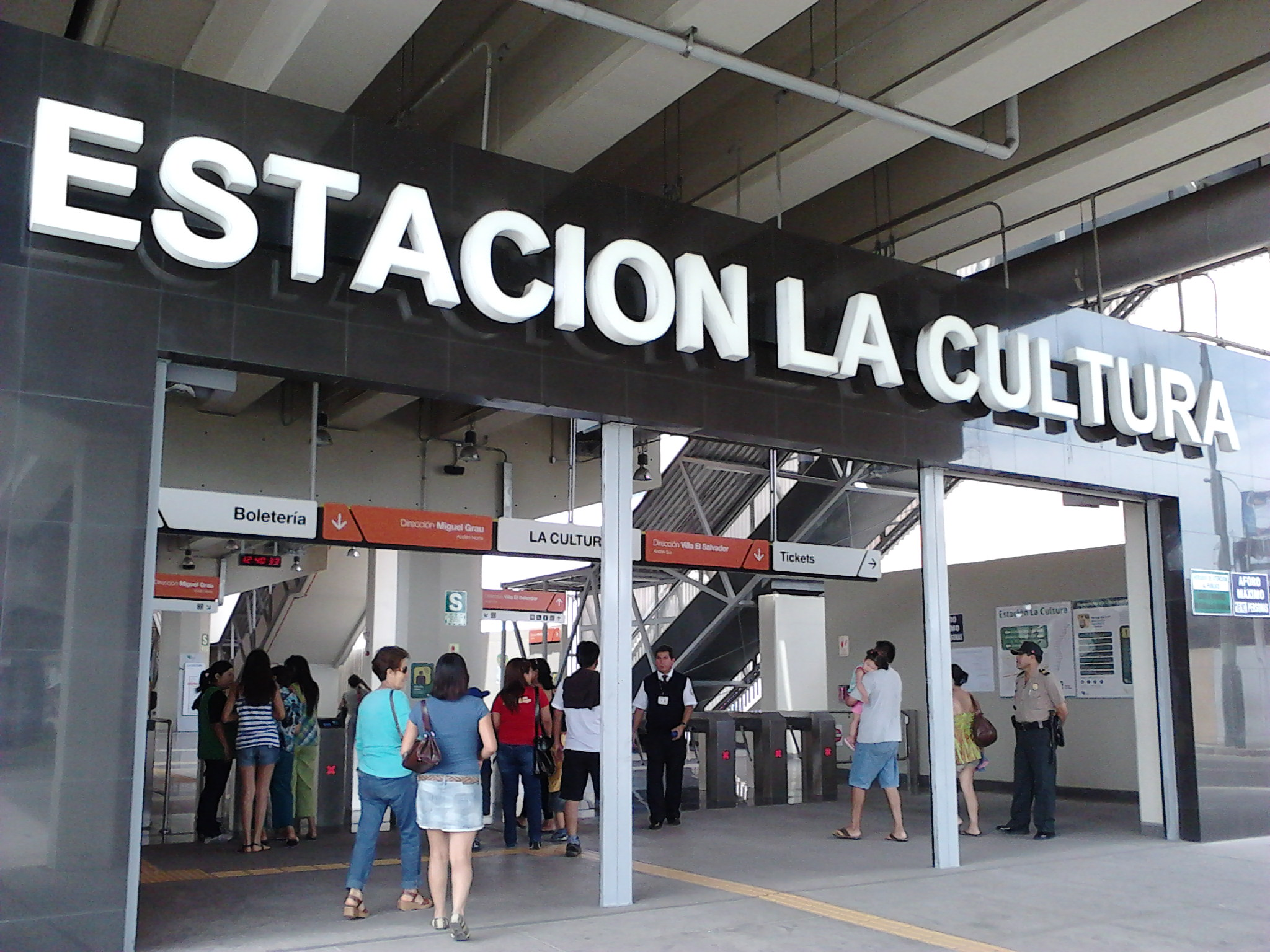 Estación La Cultura metro de lima 2012